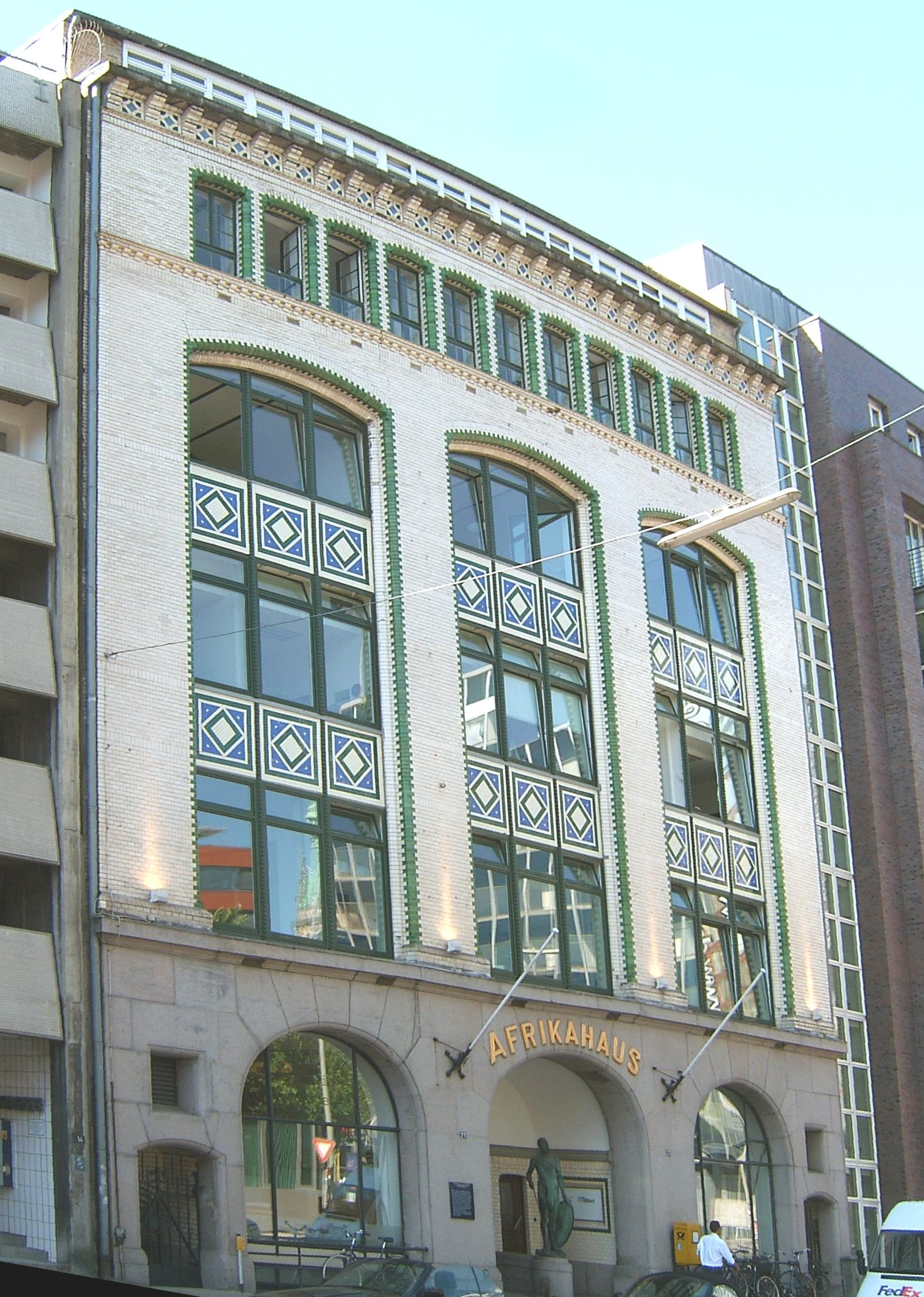 Das Afrikahaus in der Großen Reichenstraße in Hamburg-Altstadt This is a photograph of an architectural monument.